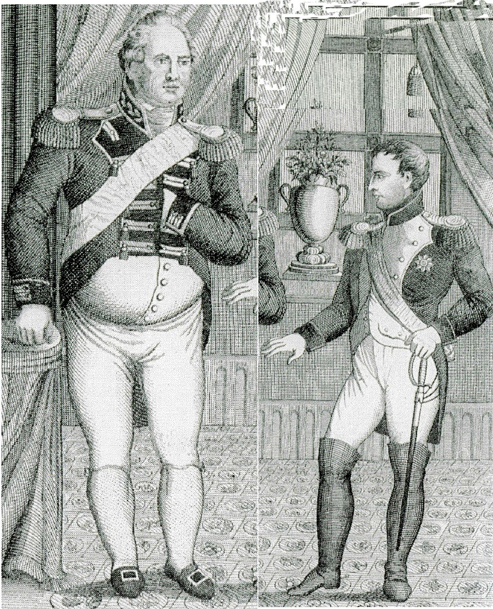 Kurfürst Friedrich von Württemberg, der spätere König Friedrich I., und Napoleon in richtiger Größenrelation Auf der Basis der Lithographie von 1824 Körpergröße Friedrichs (211cm) in Relation zu Napoleon (169 cm) vergrößert. for digital remastering